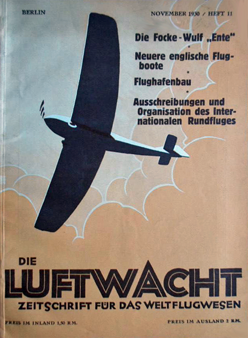 Titelseite der Zeitschrift Die Luftwacht vom November 1930, Heft 11